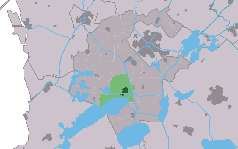 Kaartsje fan himrik fan Heech